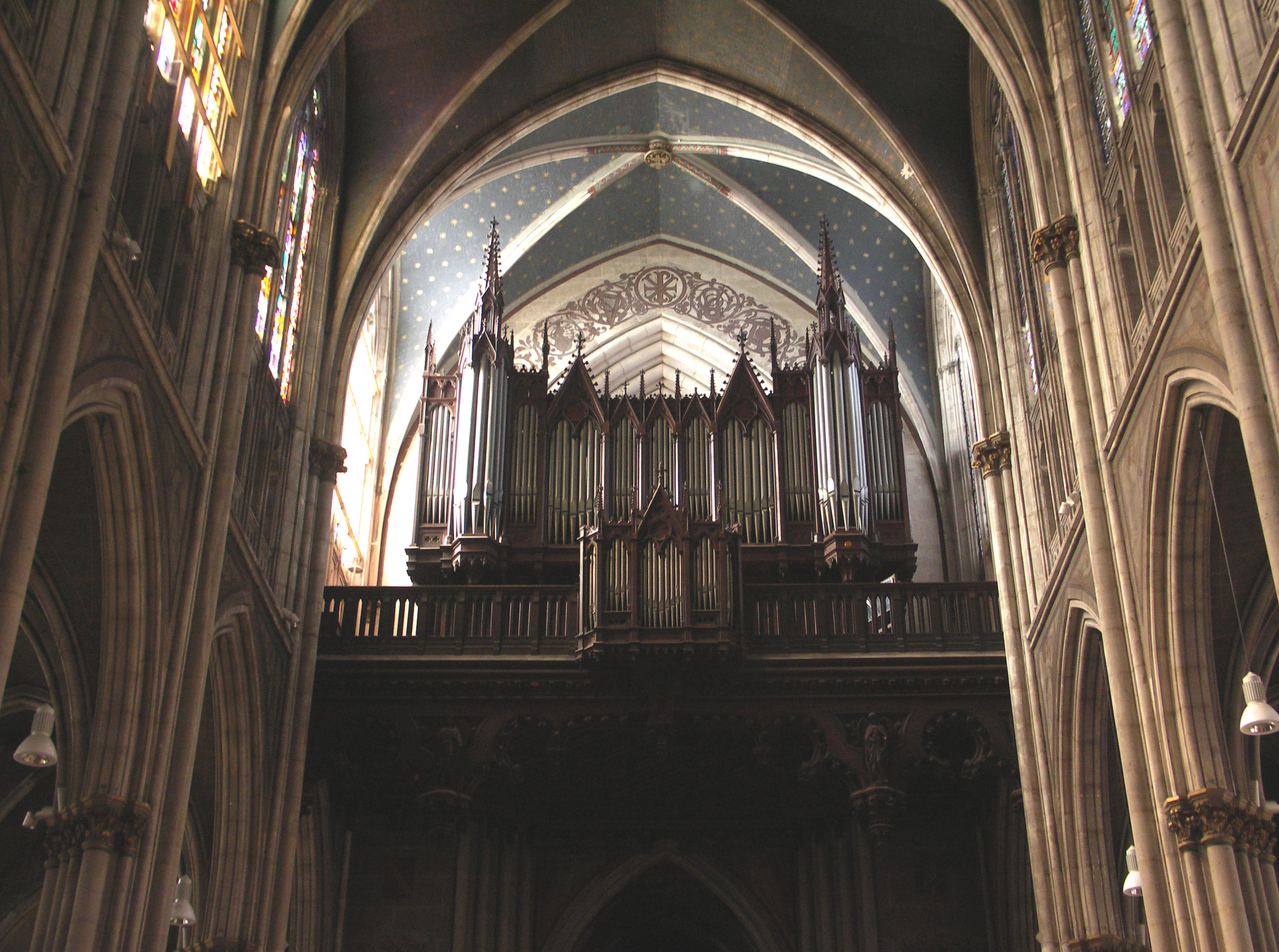 Buffet du grand orgue Merklin-Schütze (1867) de la basilique Saint-Epvre de Nancy (54, Meurthe-et-Moselle, France).